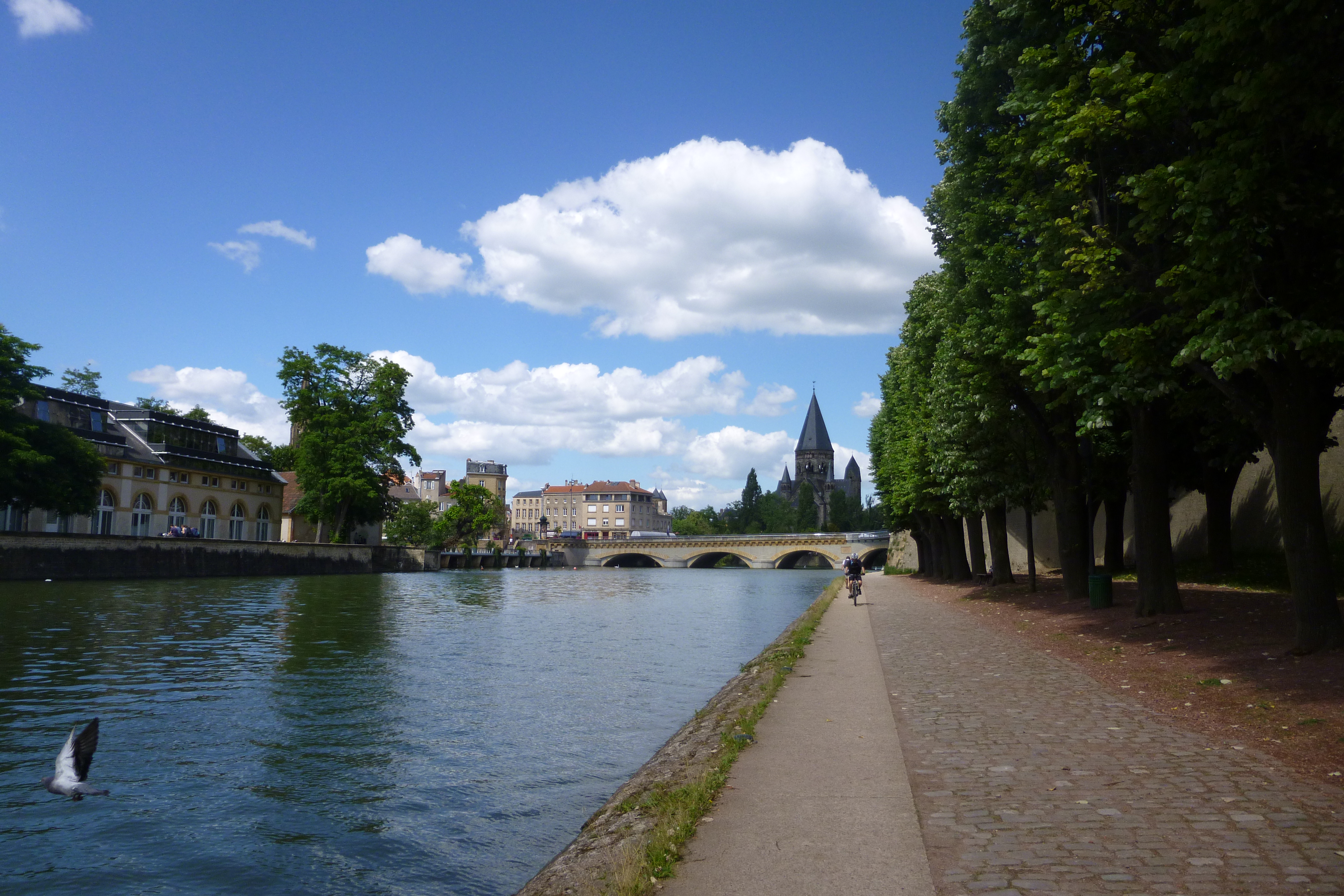 Vue sur la Moselle dans le prolongement du plan d'eau en direction du centre-ville. Vue sur le Saulcy et les bâtiments universitaires, le Moyen-Pont et le Temple Neuf, Metz (Lorraine).